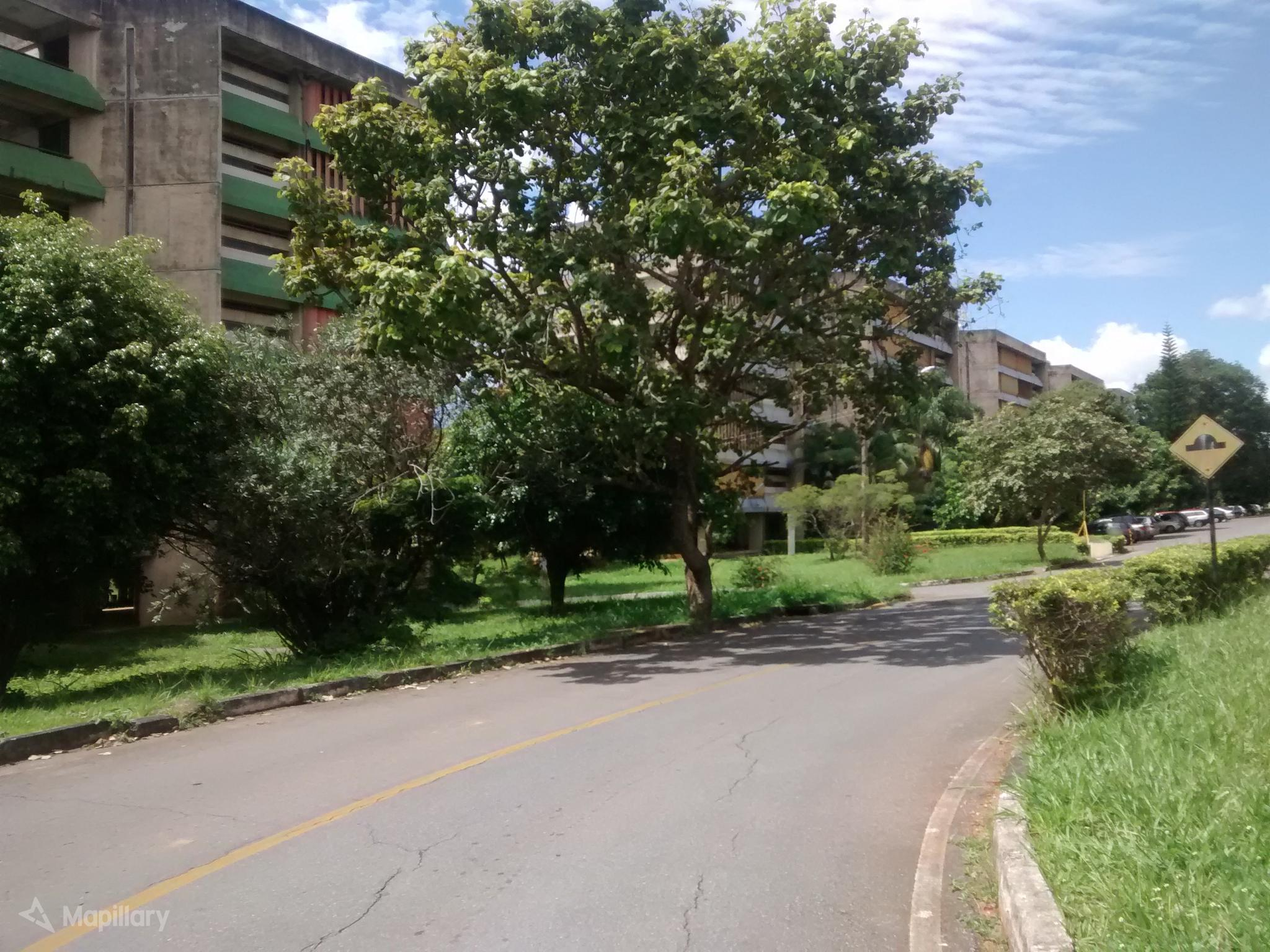 Colina, conjunto residencial localizado na Asa Norte, em Brasília